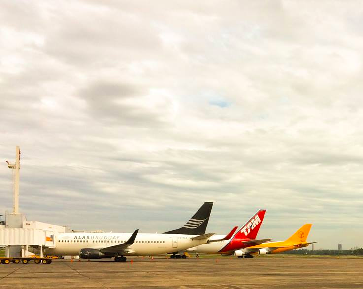 Alas en Asunción